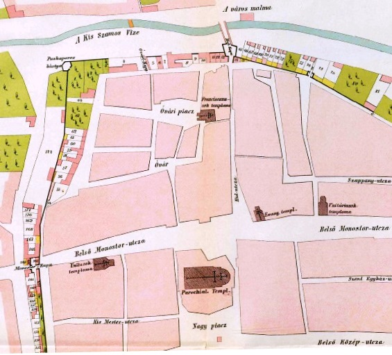 Térképrészlet a kolozsvári Óvárról, 1831